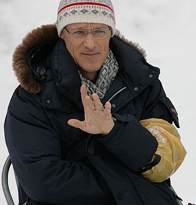 Anton Innauer podczas konkursu indywidualnego mężczyzn na skoczni normalnej w ramach Mistrzostw Świata 2013.